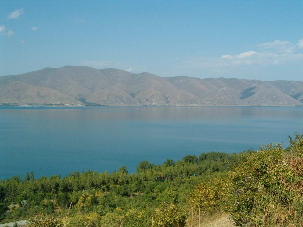 Lake Sevan